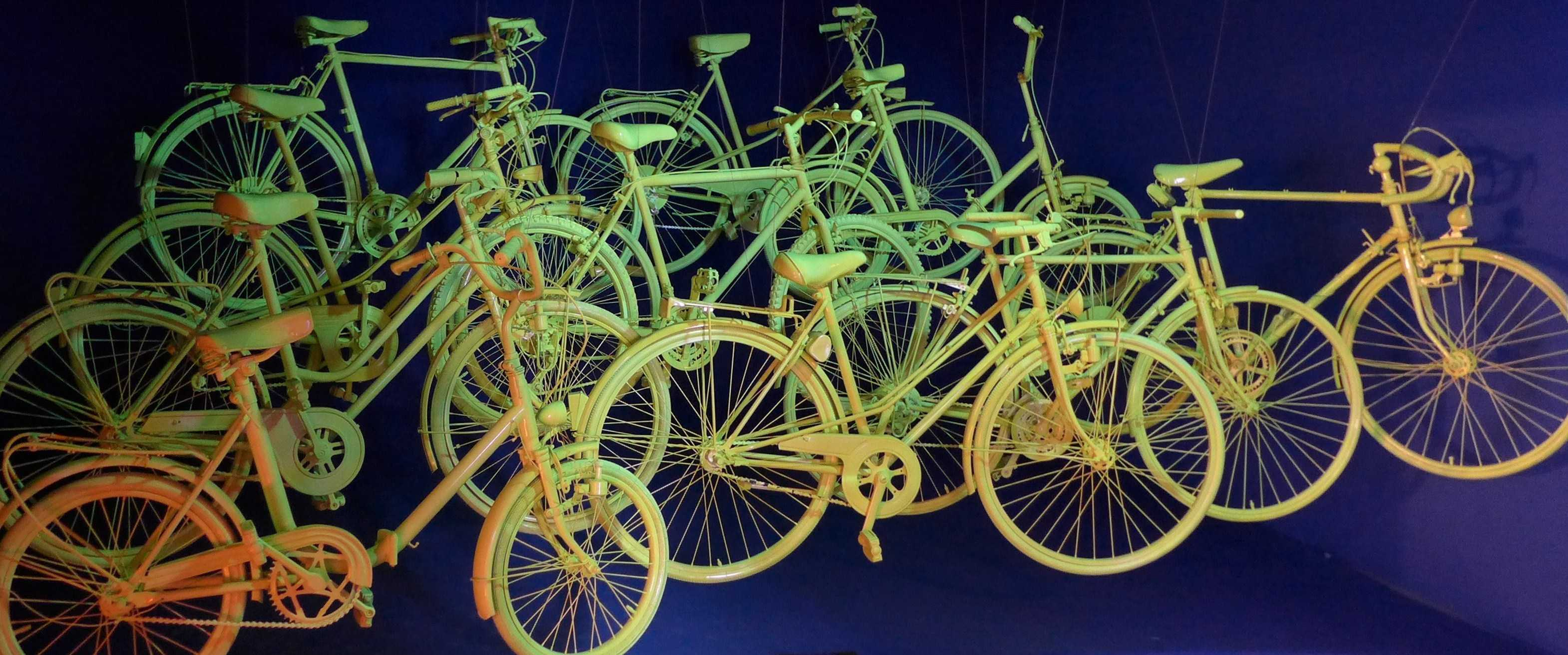 Deko am Eingang zum Radmuseum in Einbeck